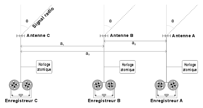 Traduction de la figure (en), elle-même issue des travaux de l'auteur Rnt20.